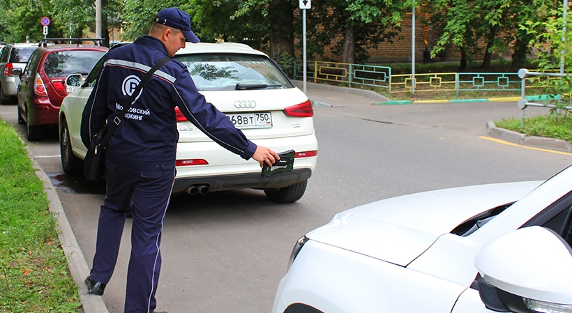 Инспектор ГКУ «Администратор московского парковочного пространства» в Москве.